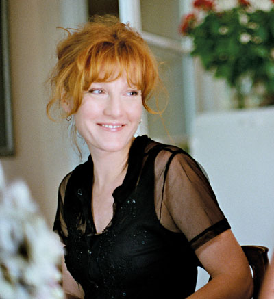 Polska malarka Joanna Sierko-Filipowska